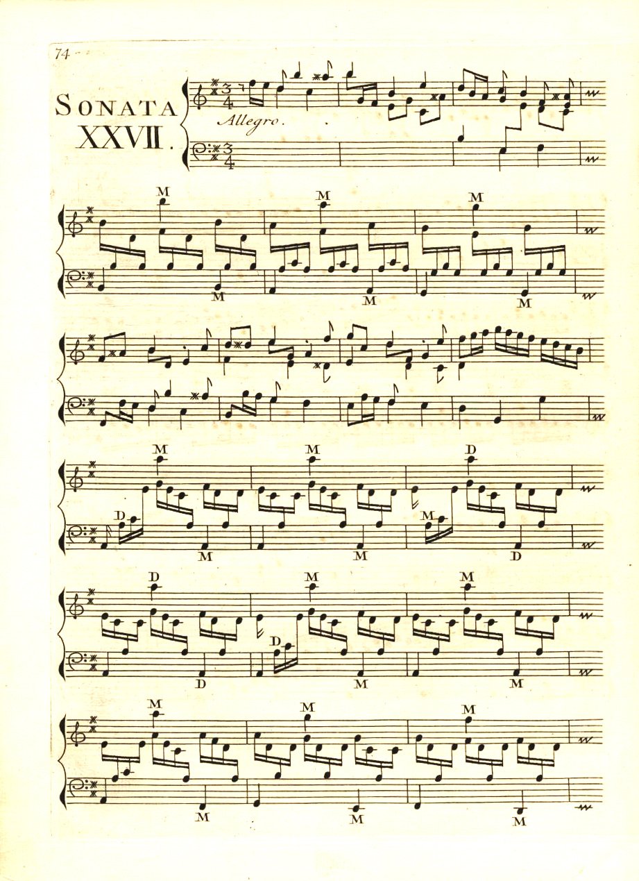 La sonate K. 27, dans une édition des Essercizi per gravicembalo, publiés à Amsterdam en 1742.